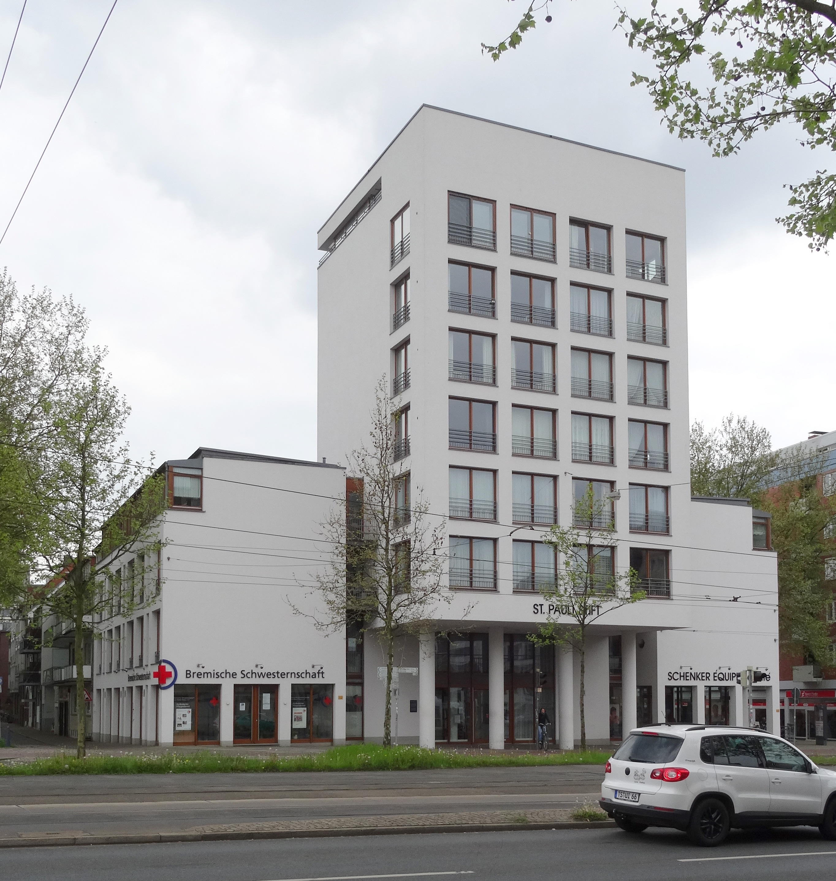 Altenwohnanlage St. Pauli Stift in Bremen. Das Gebäude gehört zu den bedeutenden Bremer Bauwerken